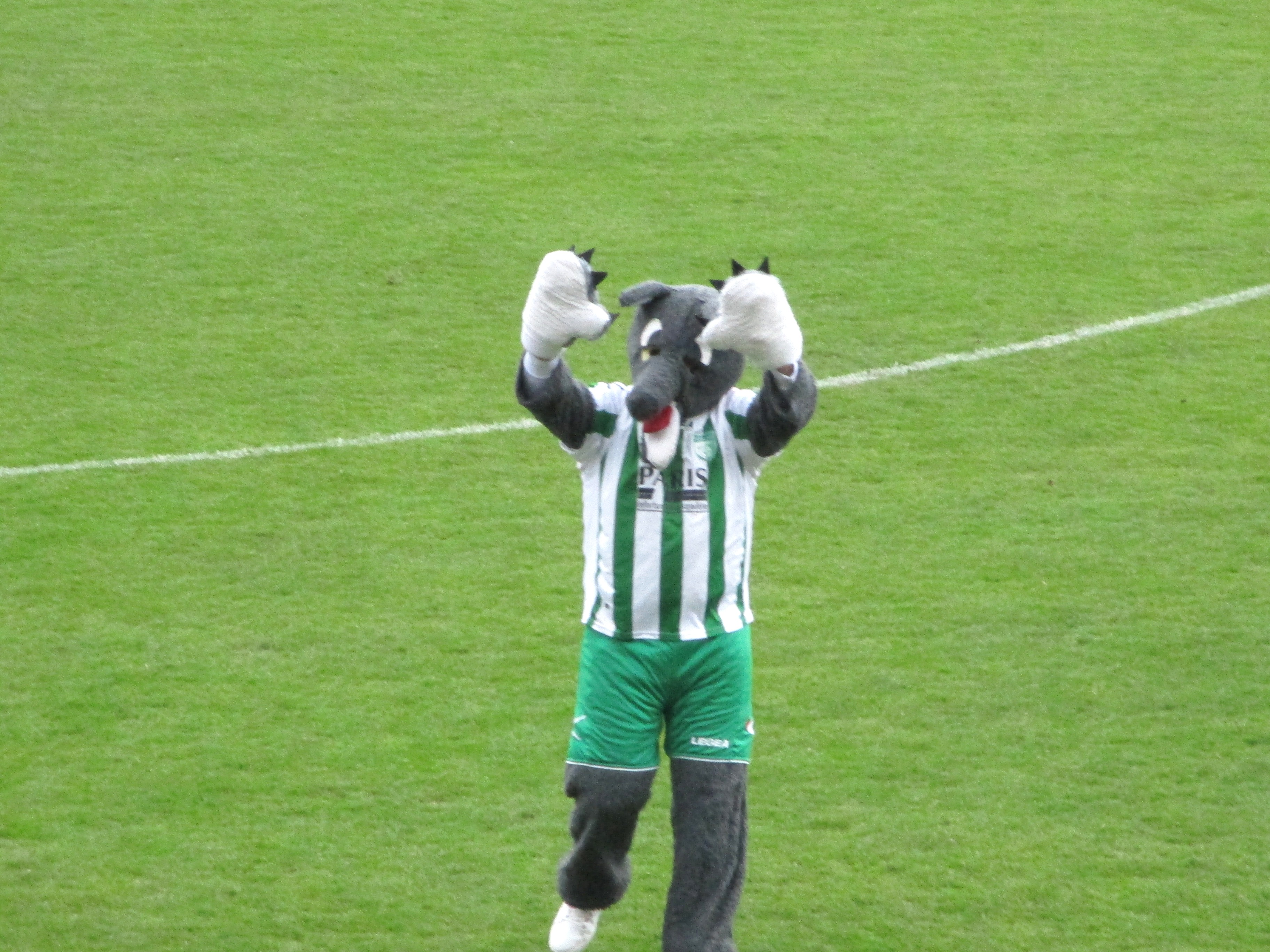 Mascotte dell'Avezzano Calcio